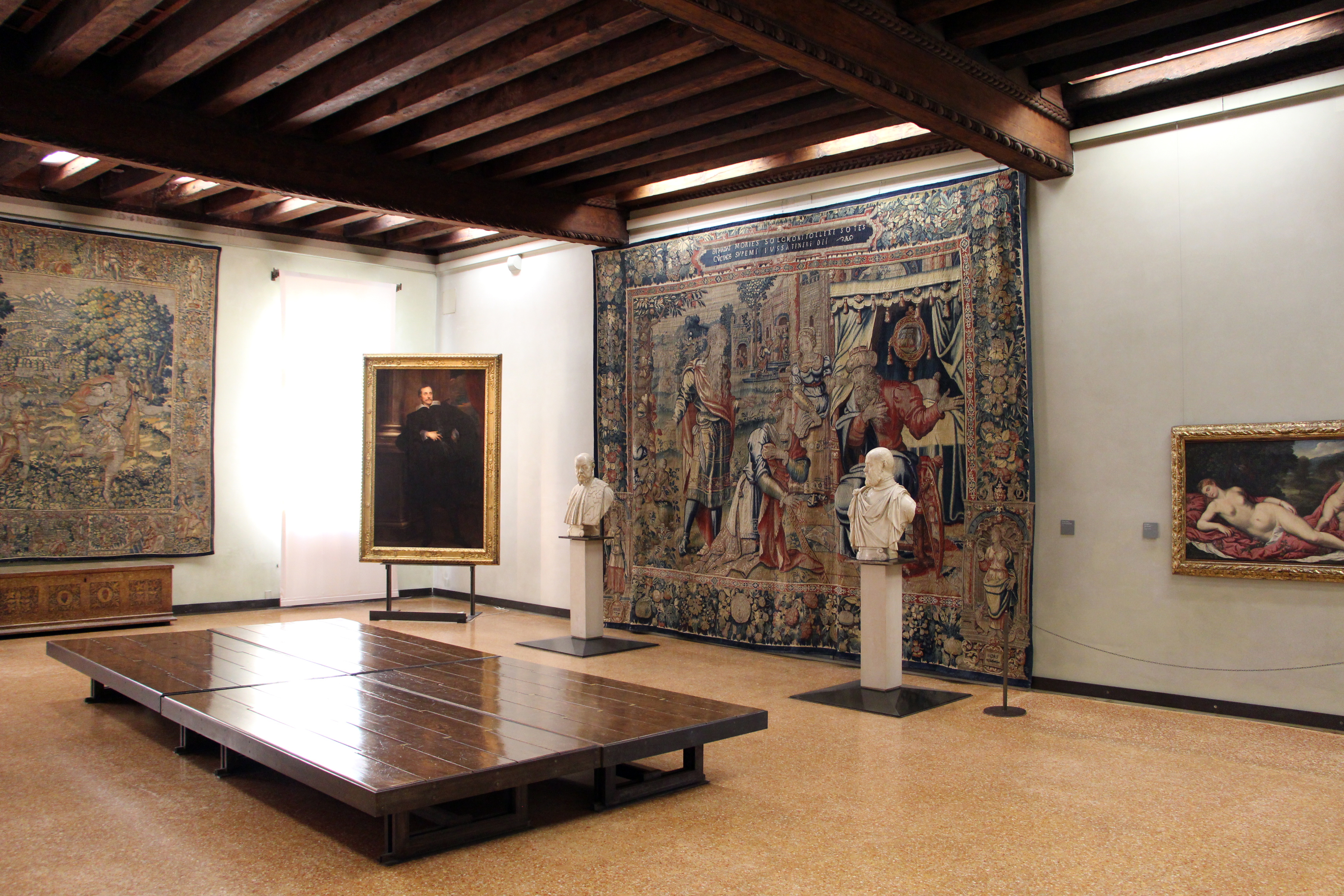 Galleria G. Franchetti alla Ca' d'Oro - MIBAC This is a photo of a monument which is part of cultural heritage of Italy.